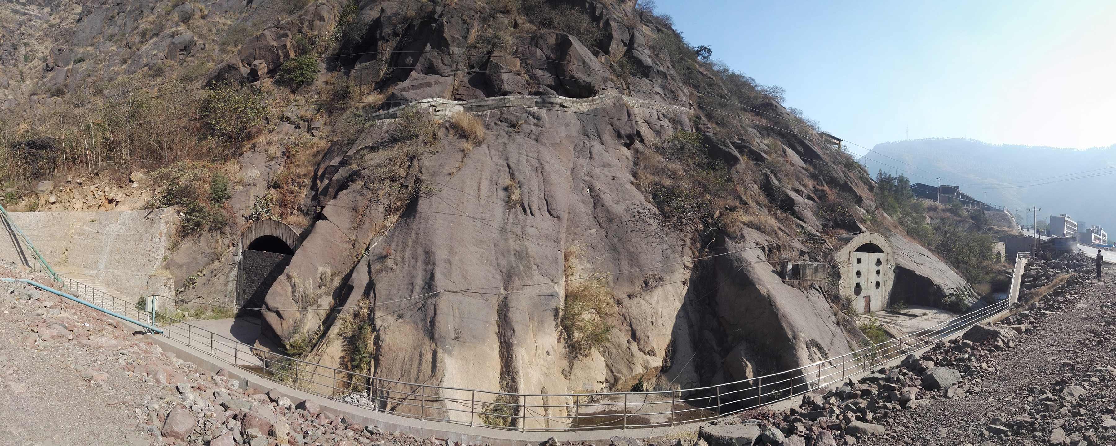 关闭十年后的503电厂。照片中可见其三个洞口，现均被墙壁封堵。三个洞口是“用”字形隧道网的出入口。隧道内曾经装有2套5万千瓦火力发电机组。 503电厂旁的金沙江上正在修建金沙水电站，横在隧道前的挡墙和不锈钢栏杆，以及照片右侧远处的道路和楼房，均为水电站新建，并非503电厂原有的景观。 此照片是全景视图，造成画面有所变形。实际三个隧道口是沿着山体一字排开。新建的挡墙和不锈钢栏杆实际是直线，并无弧度。